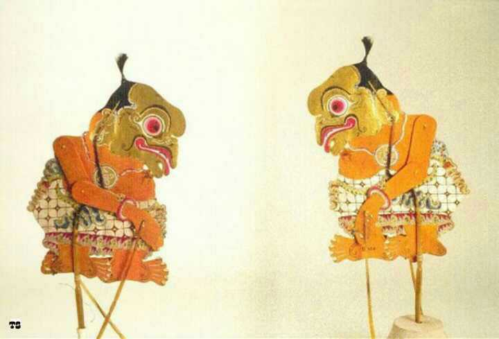 Bawor adalah salah satu dari Punakawan, Sosok Pembantu dari Pandawa dalam Wayang kulit gagrak Banyumasan.